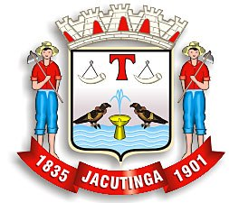 Brasão de armas do município de Jacutinga, Minas gErais, Brasil.